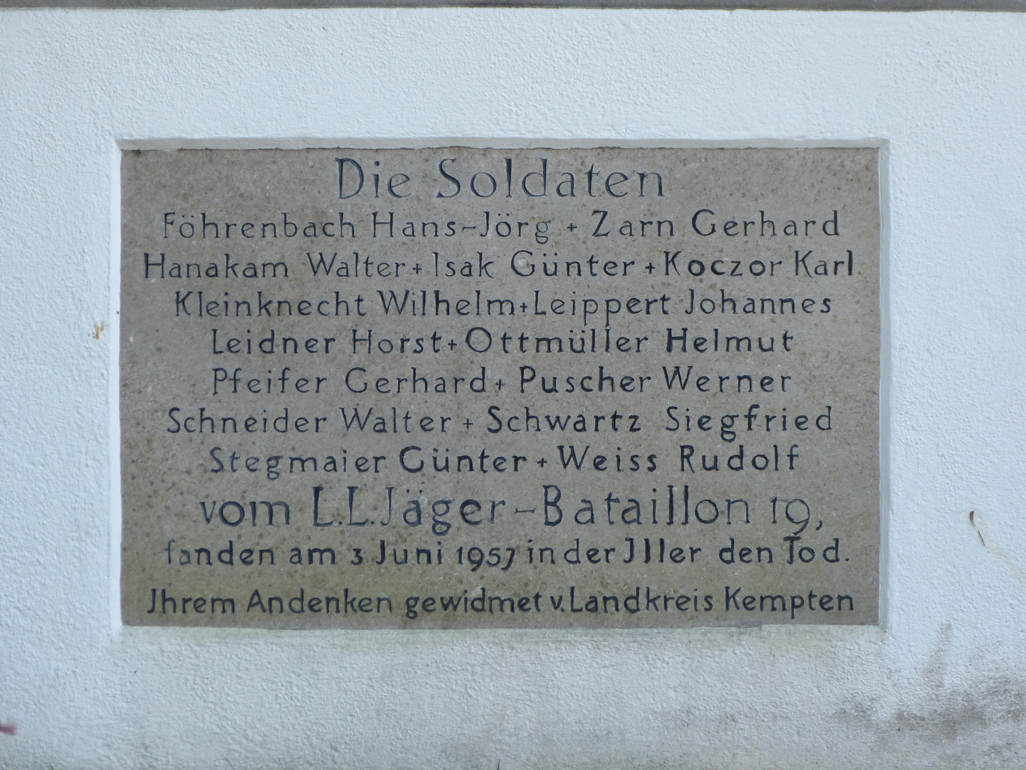 Denkmal zum Iller-Unglück bei Hirschdorf, Kempten, Bayern